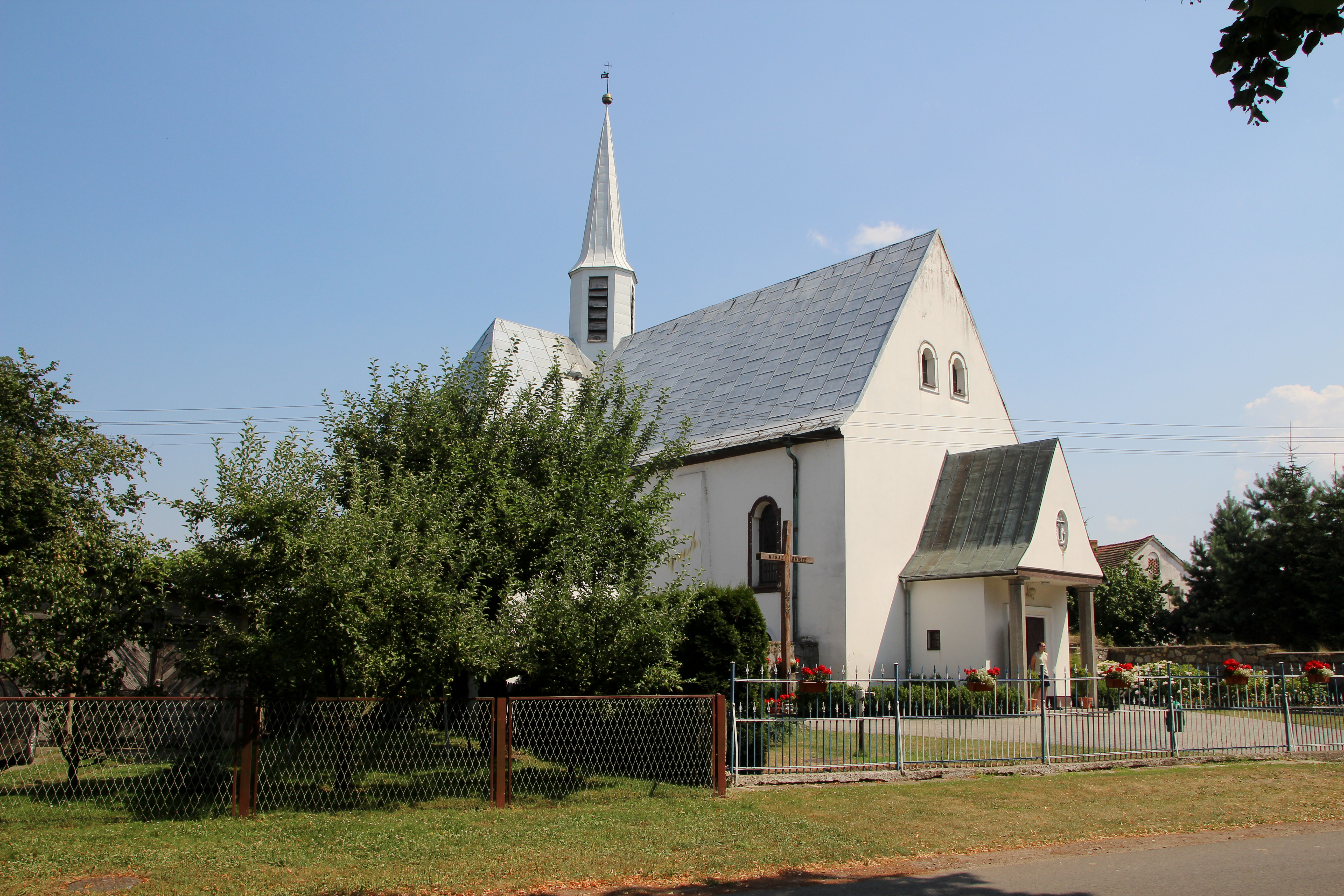 Dziewiętlice - rzymskokatolicki kościół parafialny pw. św. Marii Magdaleny, XV w., przekształcony w XVII w., powiększony 1929-30